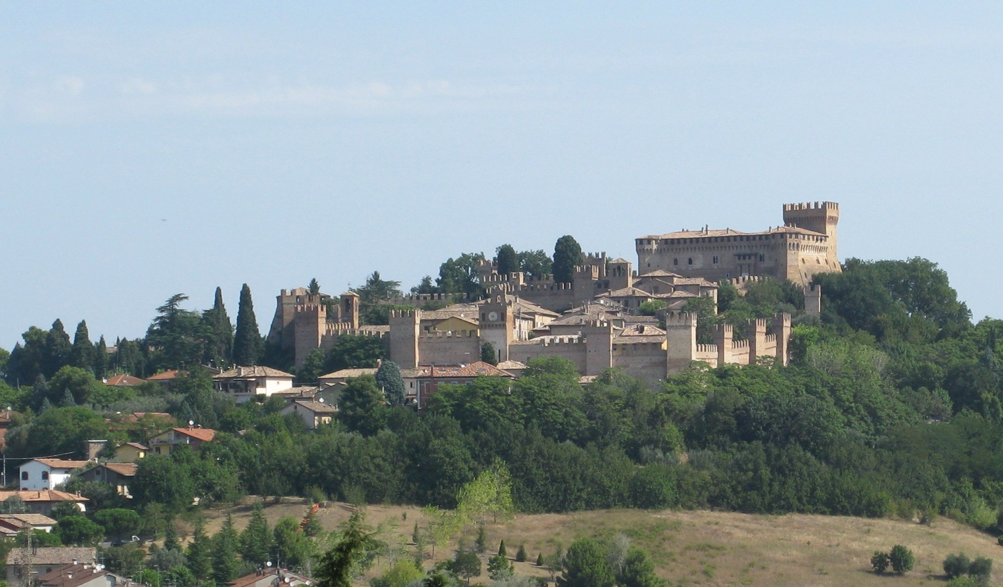 Panorama di Gradara.